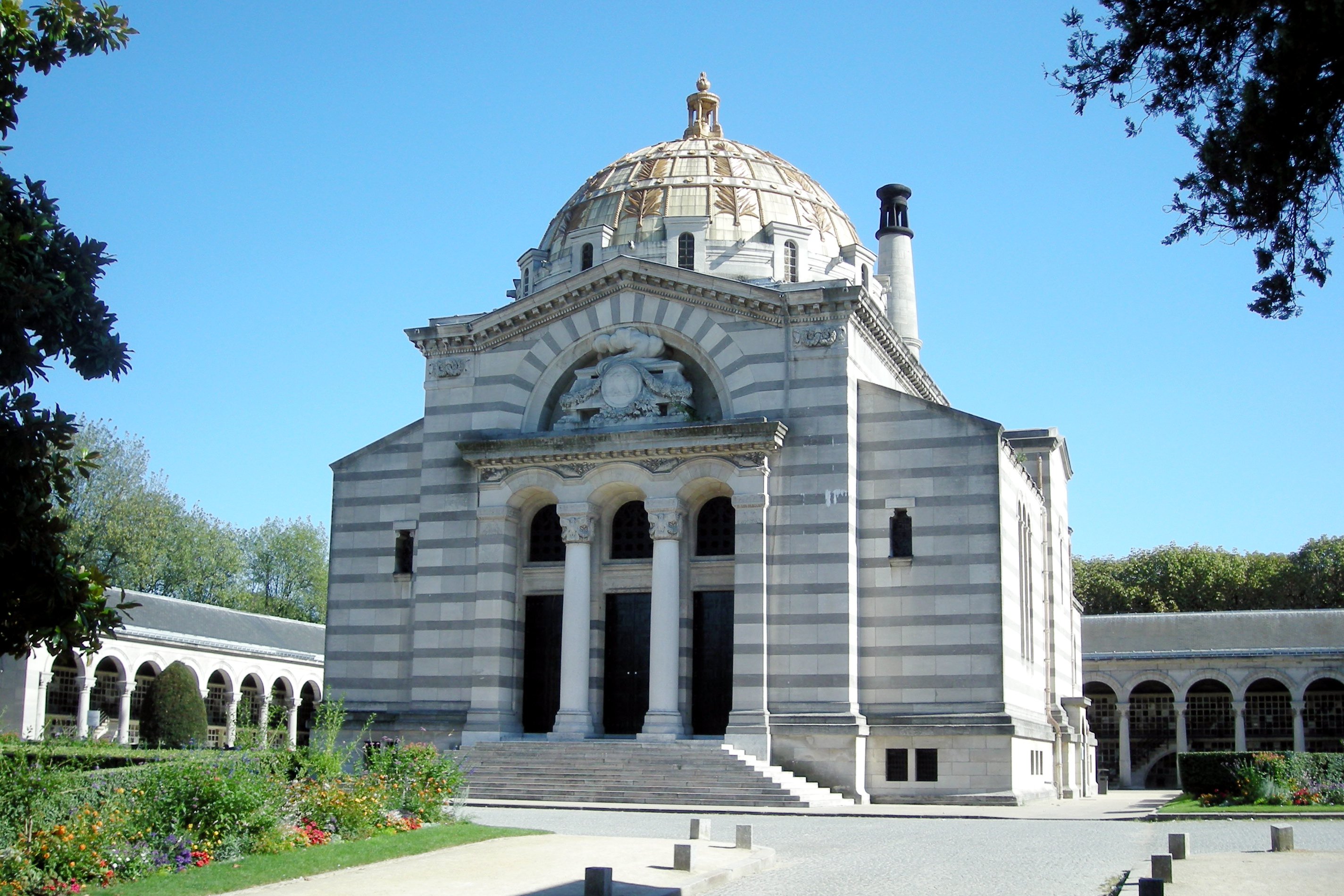 Père Lachaise Cemetery, Paris, France.